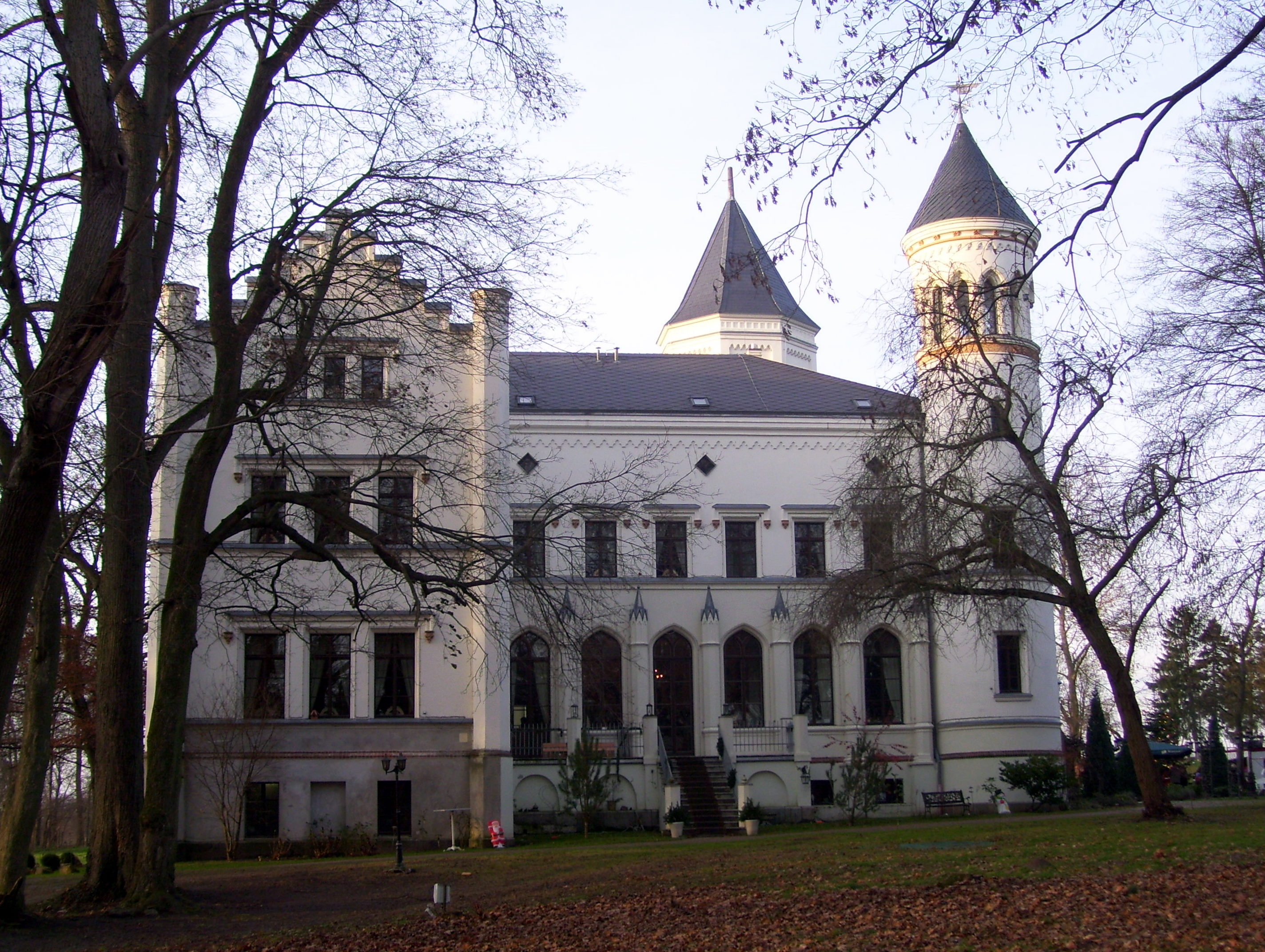 Schloss Bredenfelde, Herrenhaus im Landkreis Mecklenburgische Seenplatte, Südostansicht, Parkseite